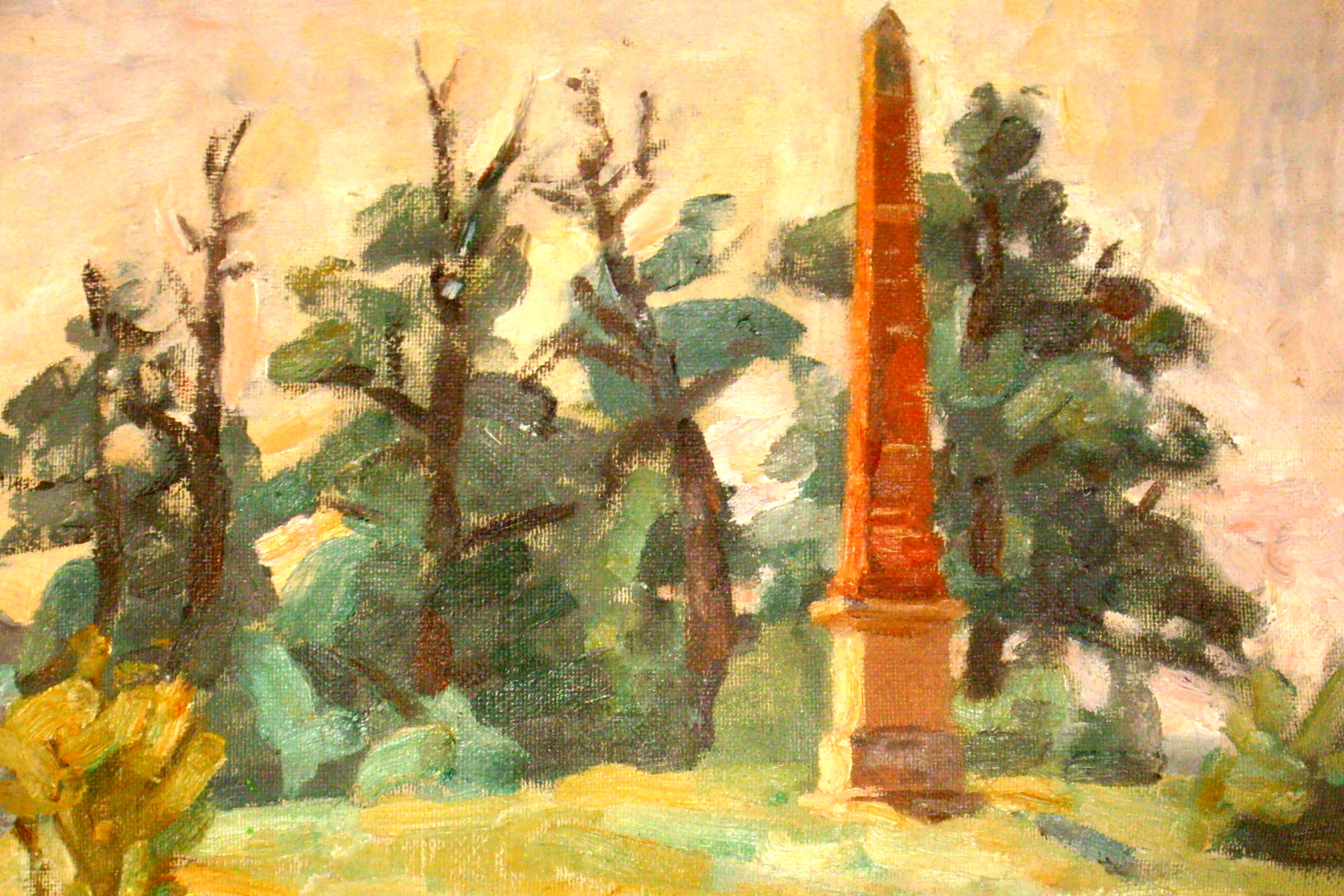 Памятник в Циререной роще